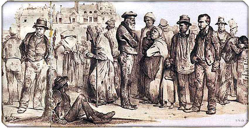 Prolétariat agricole au chômage